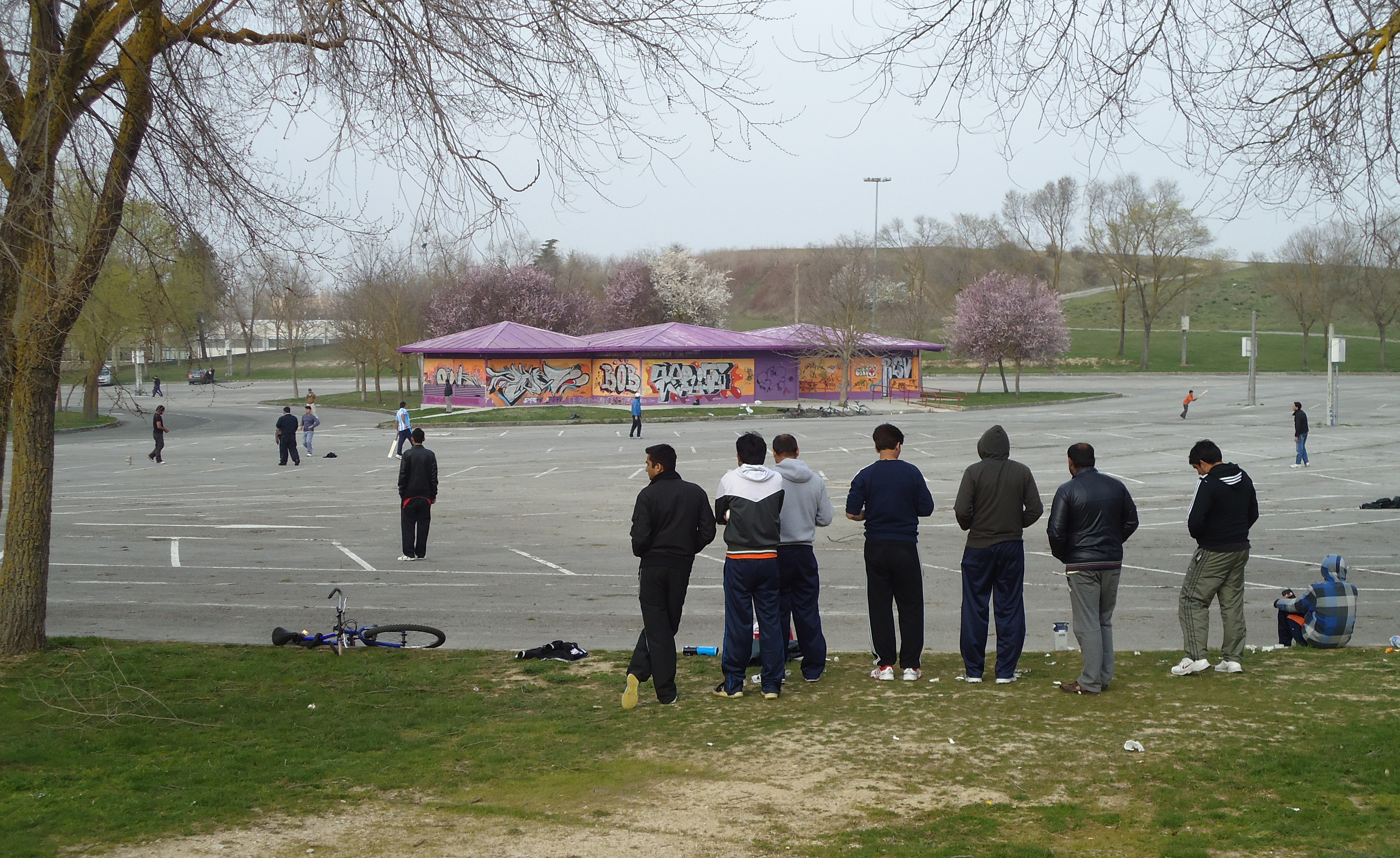 Gazteak kriketean jokatzen Mendizabala aparkalekuan (Gasteiz)